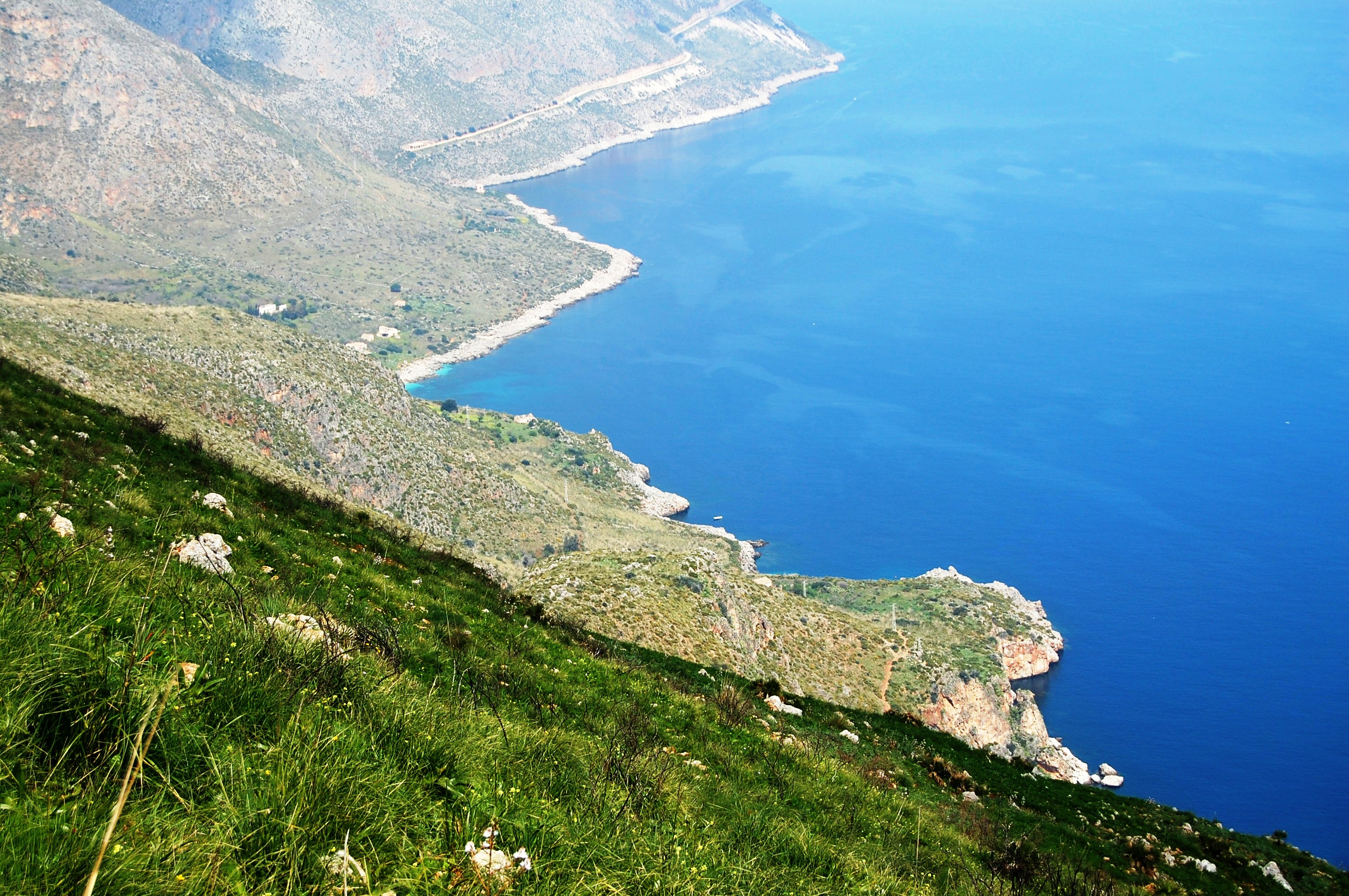 Zingaro Panorama dal sentiero di mezza costa